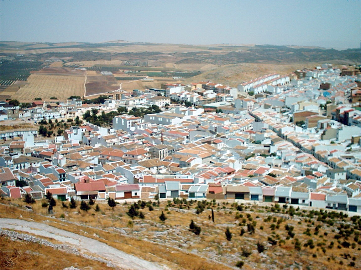 Vista del casco urbano de Teba desde el Castillo de la Estrella